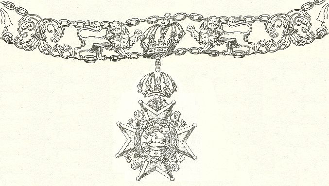 Het kleinood van de Welfenorde aan de gouden keten